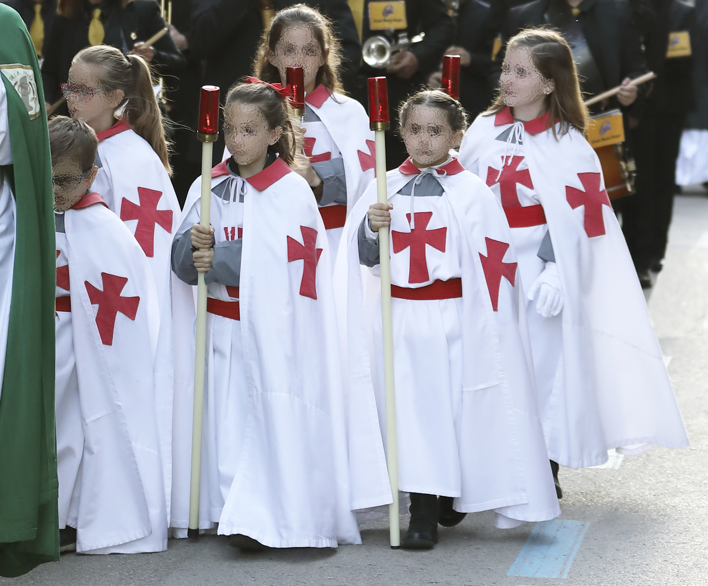 Cruzados desfilando en la procesión del Rosario Penitencial Obrero (Martes Santo)